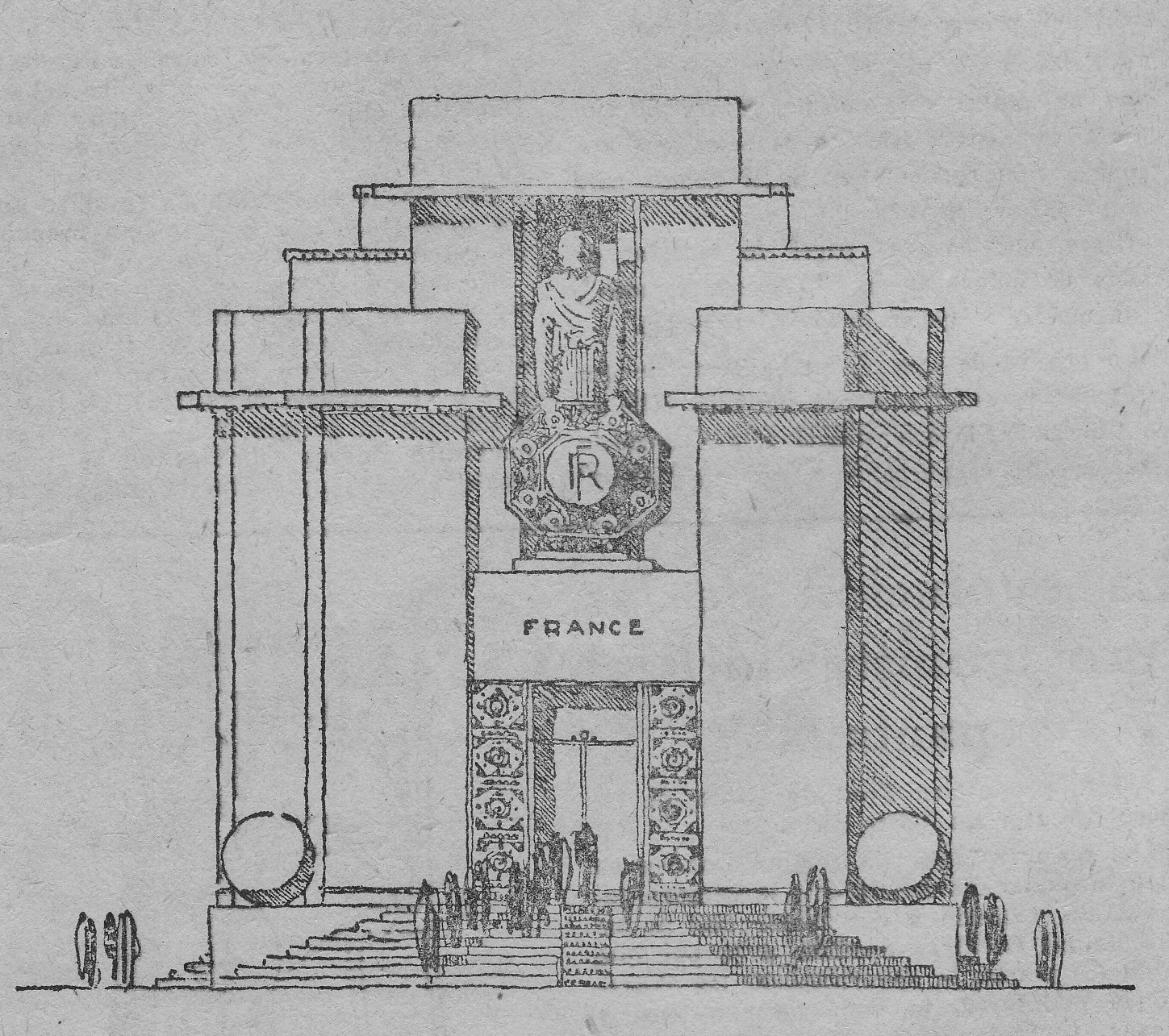 Pavelló de França: obra de Georges Wybo fet el 1929 per a l'Exposició Universal de Barcelona-1929 (Catalunya).